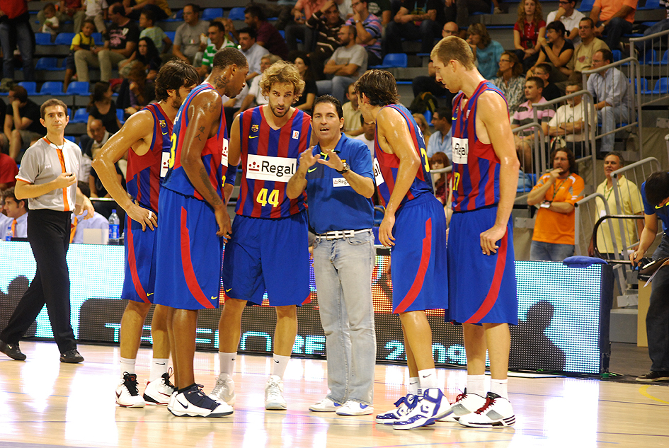 Pascual donant indicacions al Regal Barça, durant El clàssic.